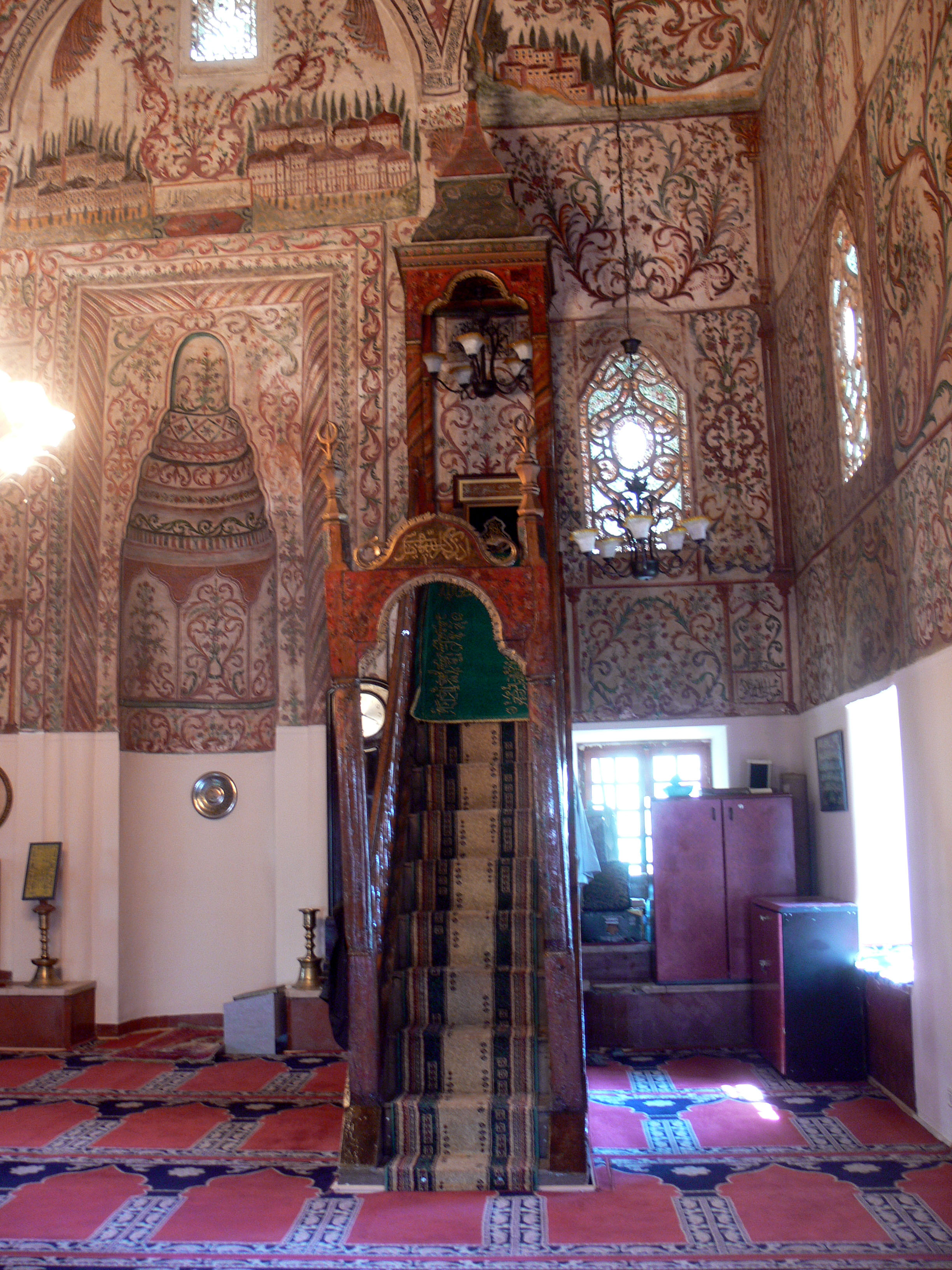 Tirana. Et'hem Beu-Mosque.